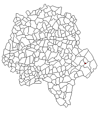 Carte de situation de la commune de Montrésor sur le département d'Indre et Loire